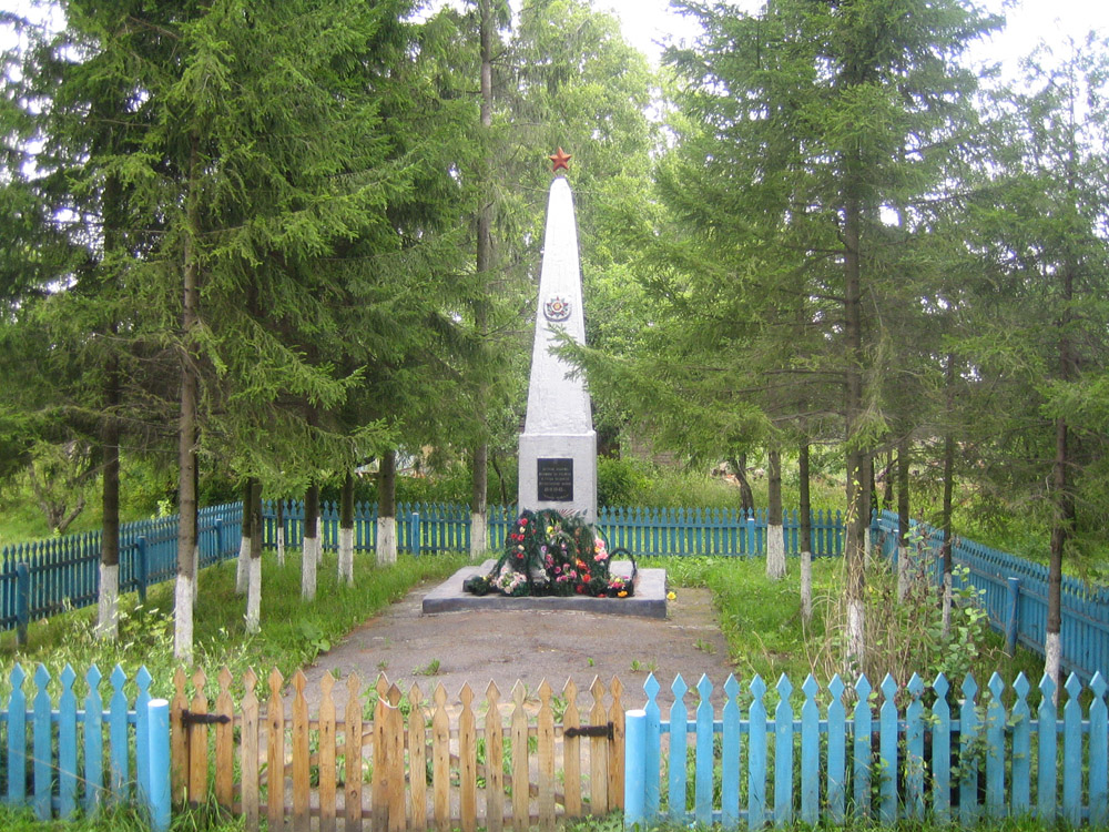 Воинское захоронение в Касне